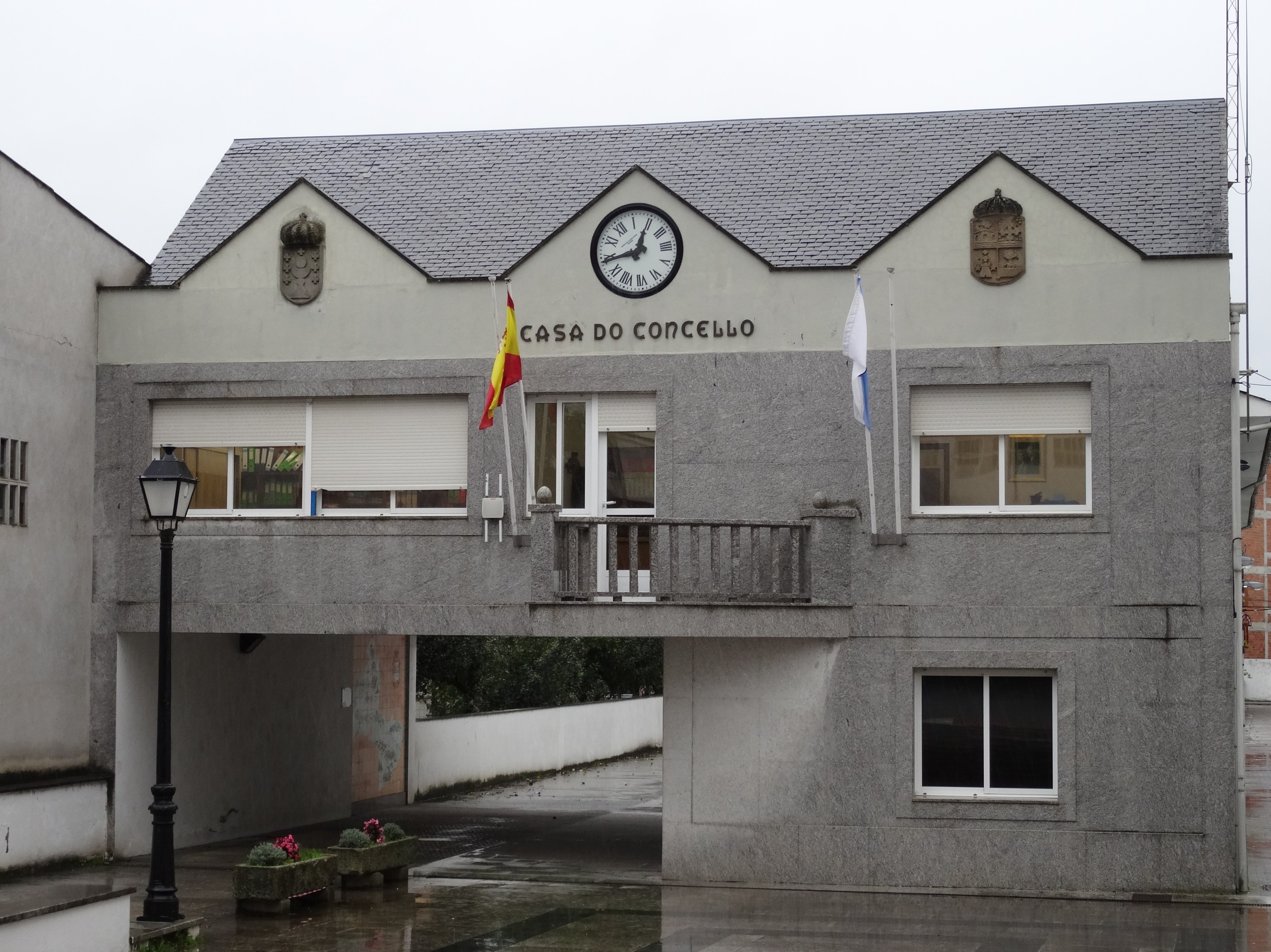 Casa do concello de Láncara.